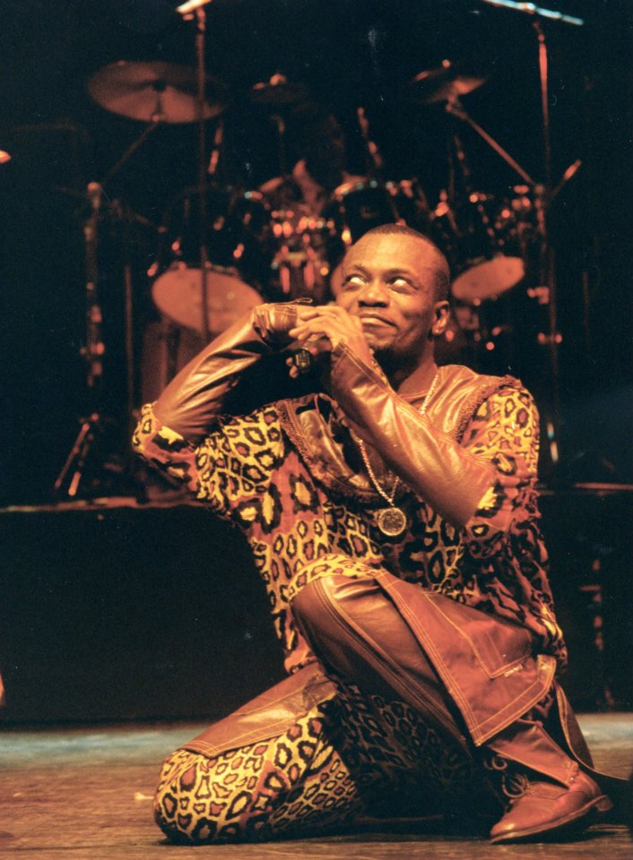 Le Génie en plein concert